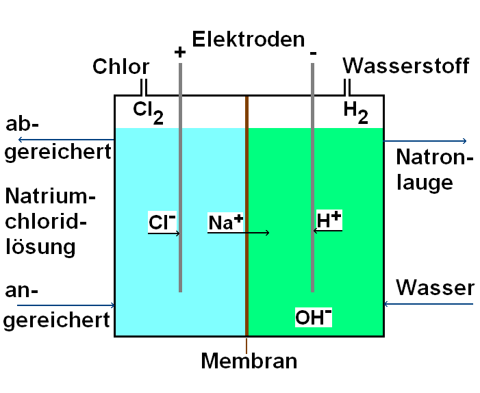 Chloralkalielektrolyse nach dem Membranverfahren